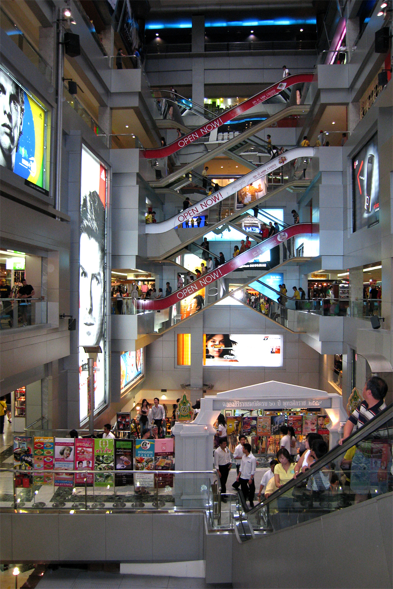 Escalateurs déservant les 8 niveaux de MBK. Photographie par Christophe COAT